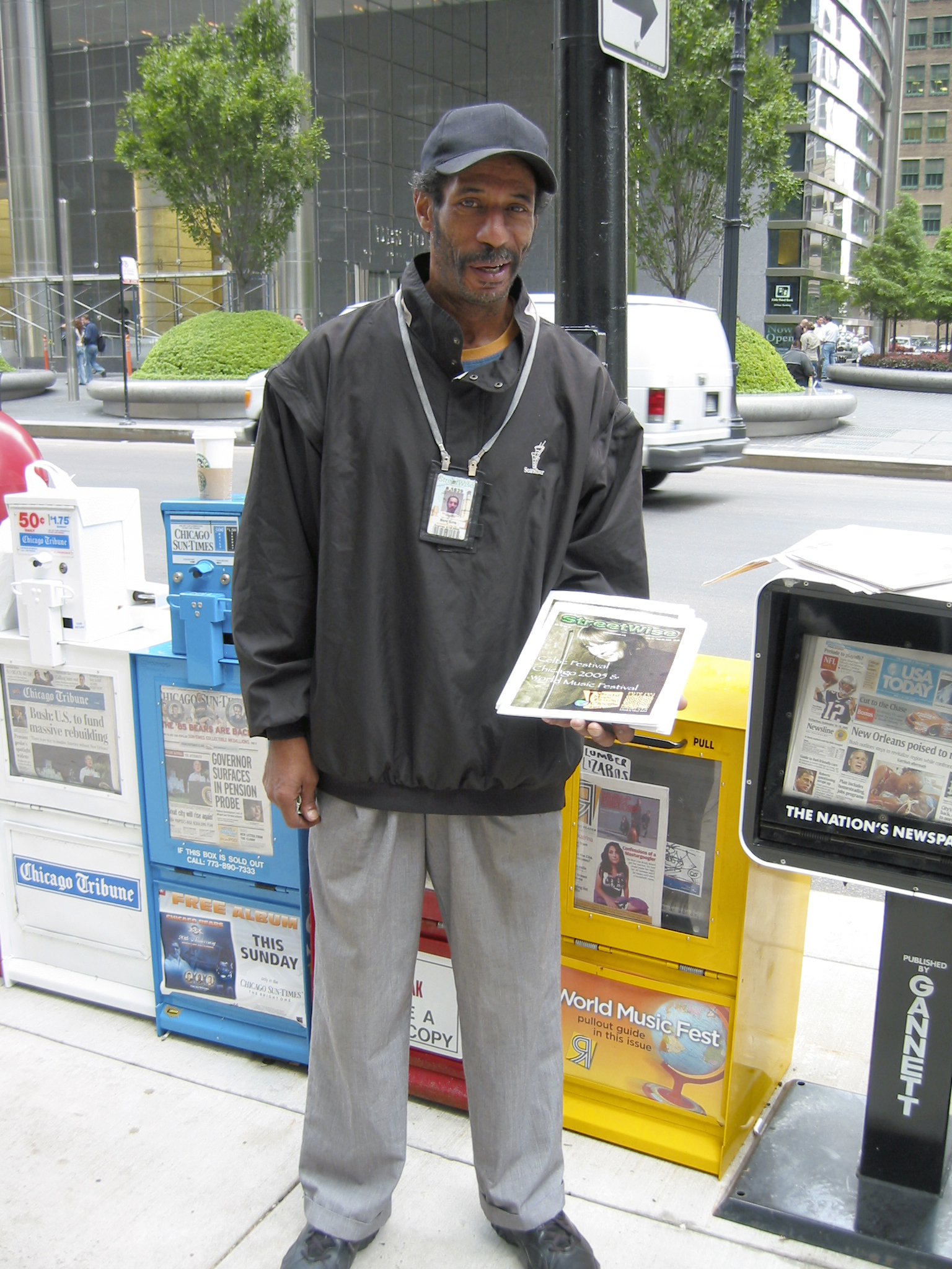 StreetWise vendor in 2005.